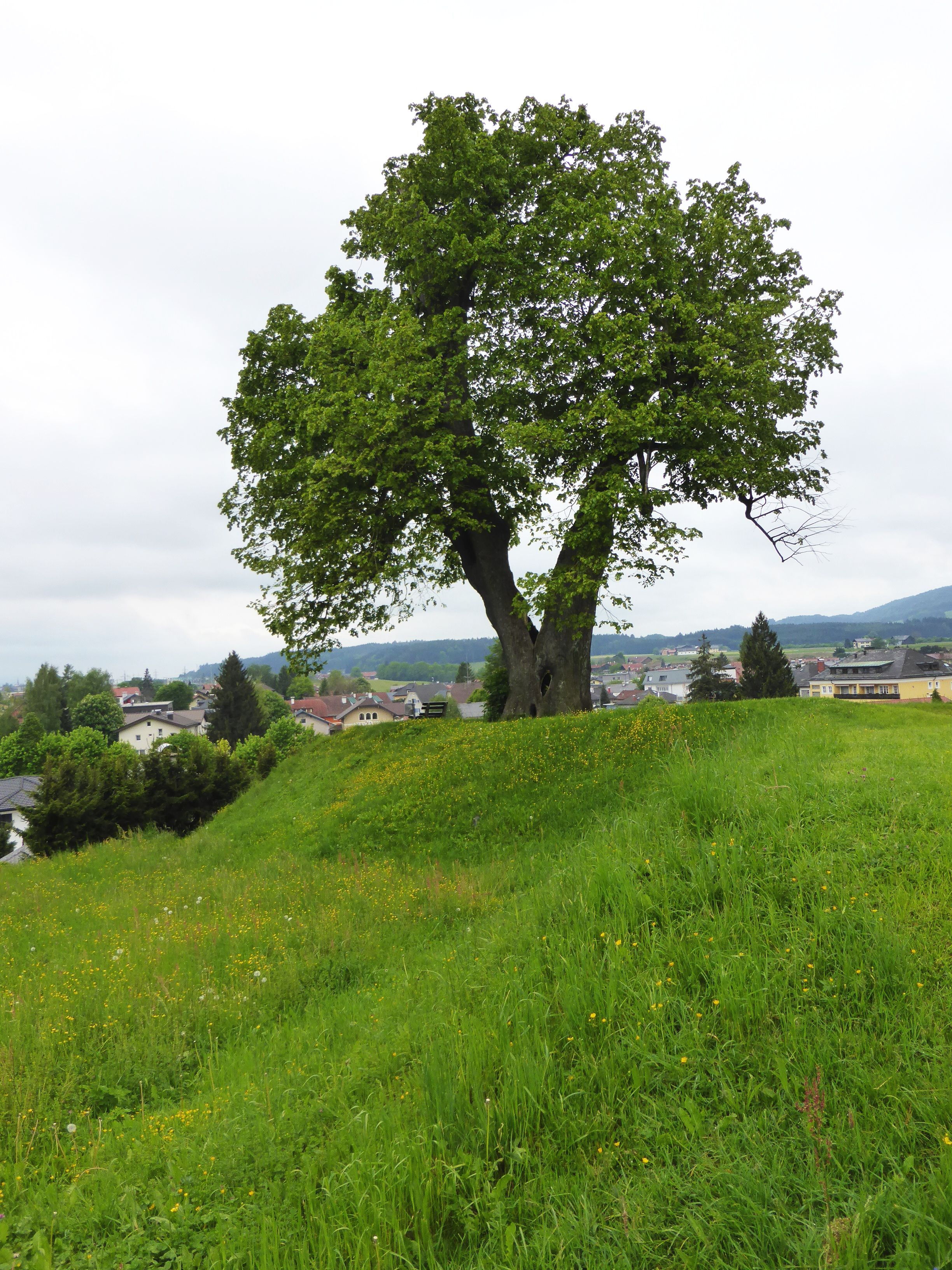 Befestigungsanlage, Schanze am Kirchhügel This media shows the natural monument in Salzburg with the ID NDM00015.